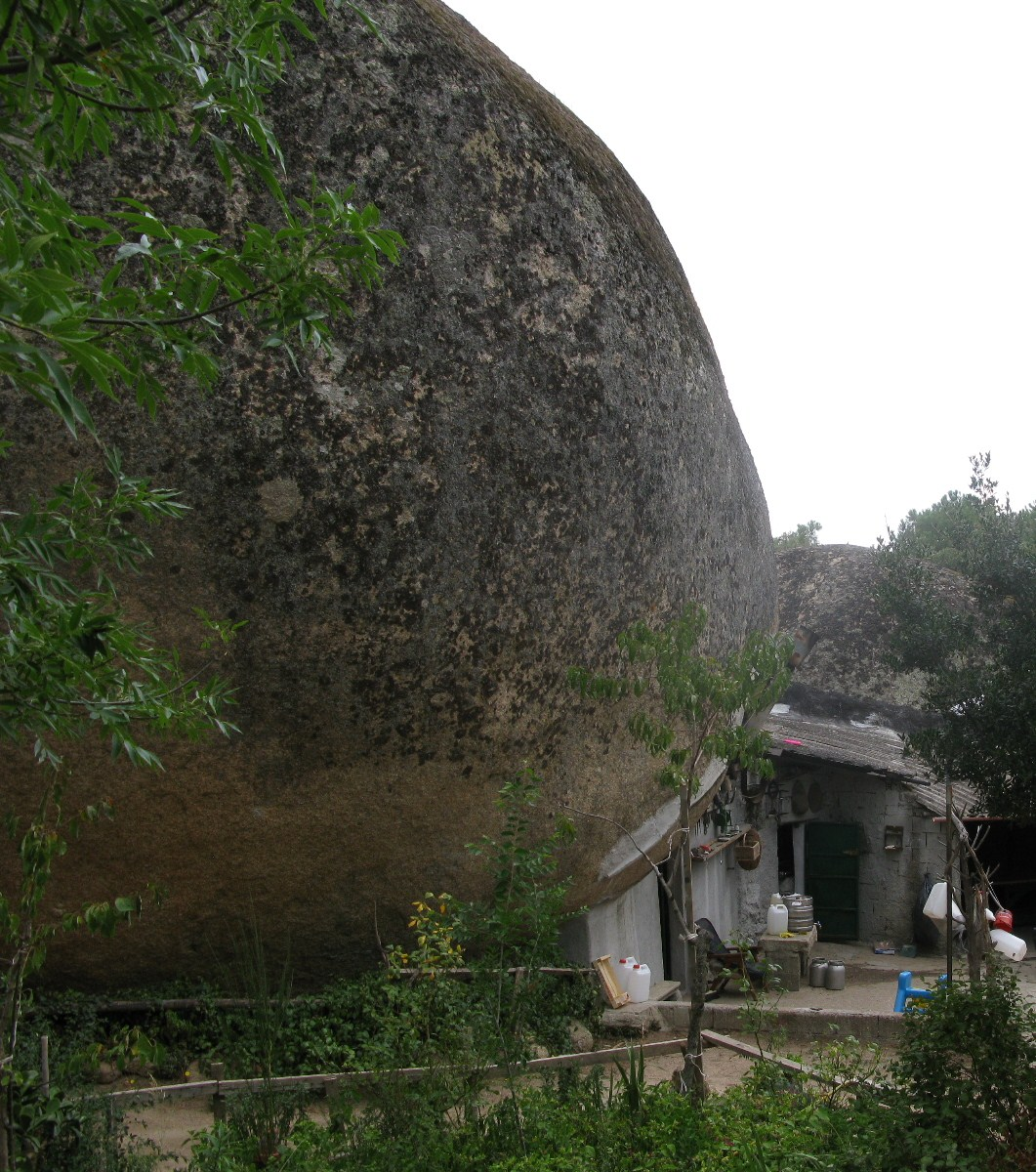 Casa nella roccia - Nuoro - sa Conca